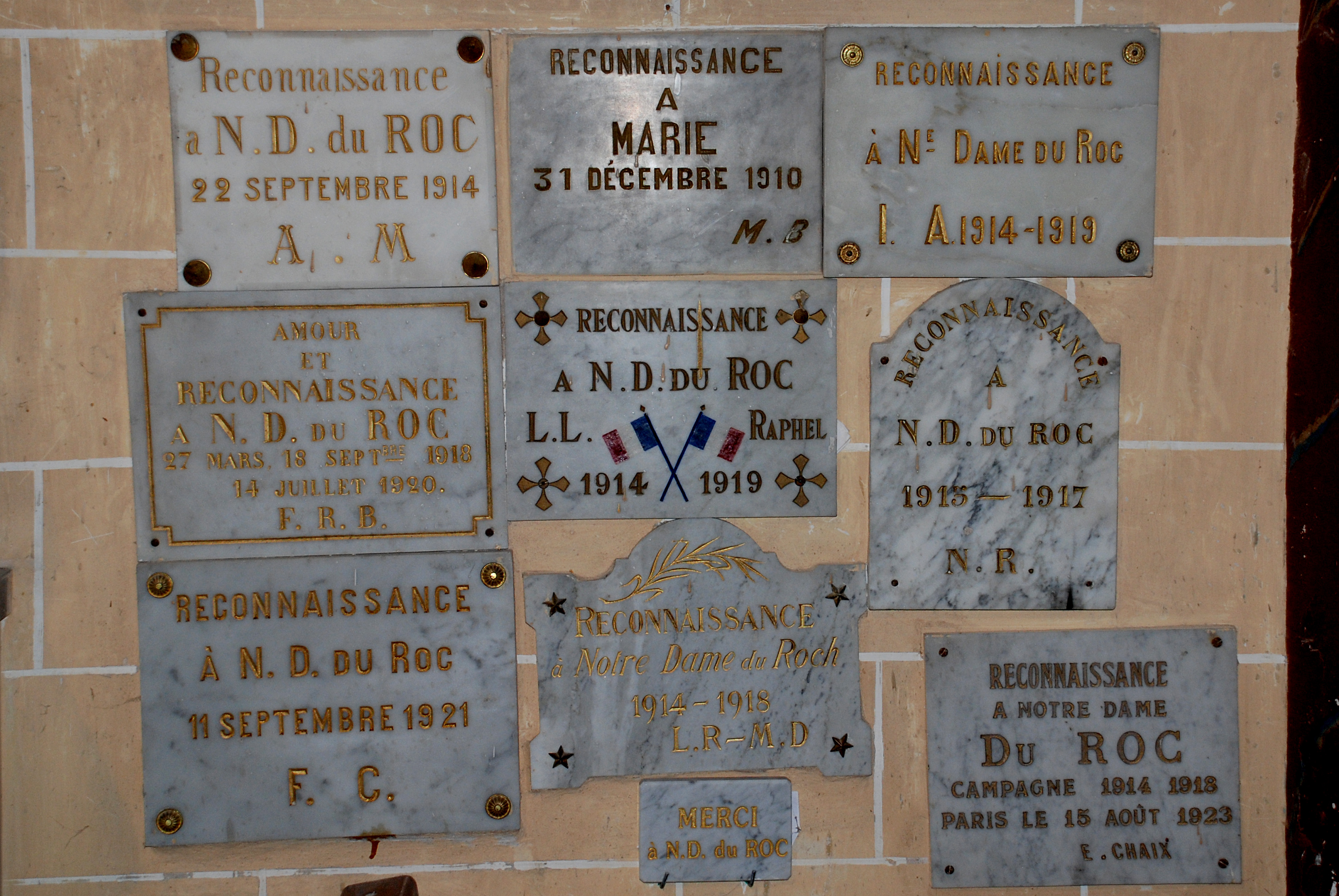 Castellane, Chapelle Notre Dame du Roc intérieur